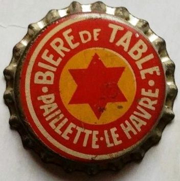 Capsule de bière française Paillette (Seine-Maritime)